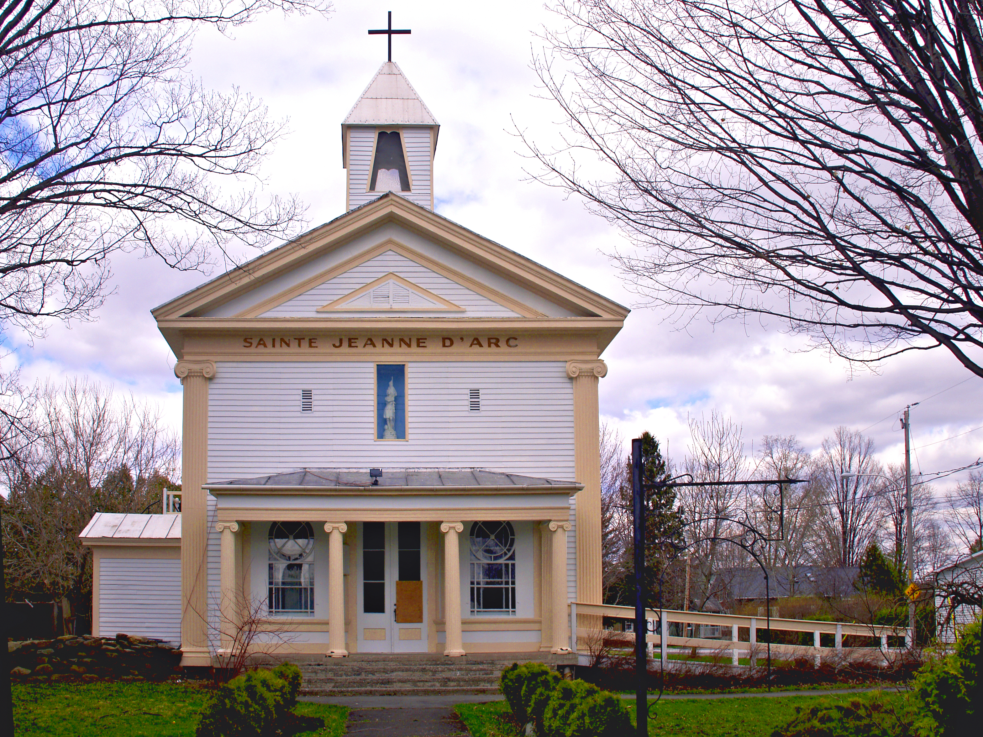 Stanbridge East - Eglise catholique Sainte-Jeanne d'Arc